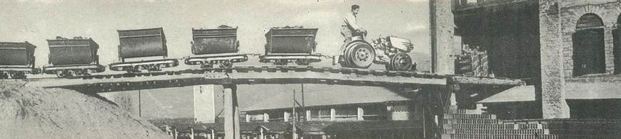 Same Trattori "4R"-10 con rugte metalliche per Decauville